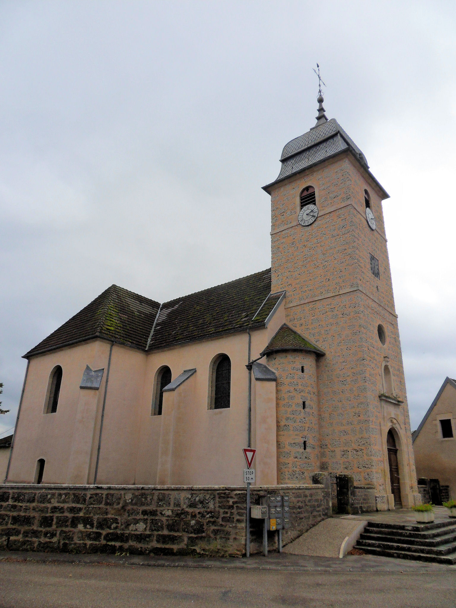 Vadans (Haute-Saône) (Haute-Saône) L'Église